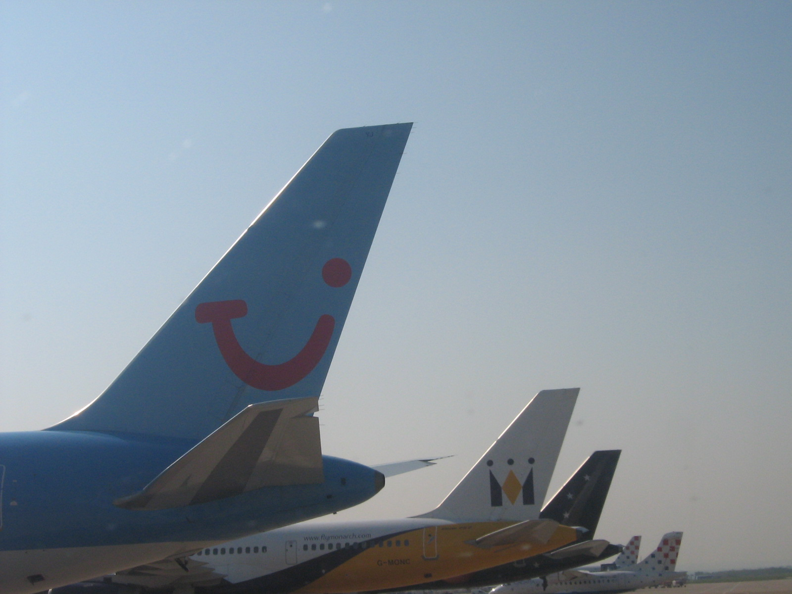 Aircraft vertical stabilizers